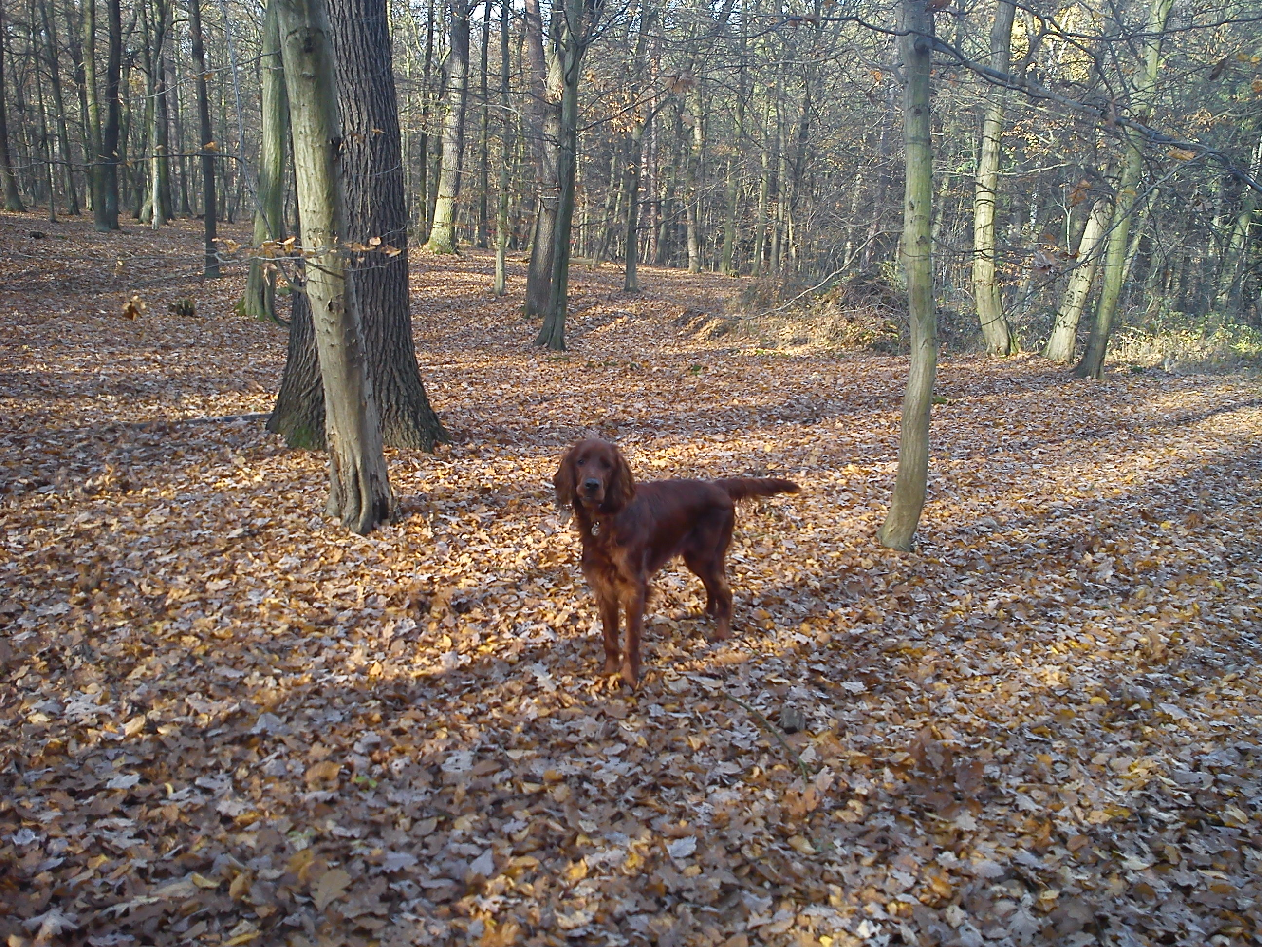 volně puštěný pes tam, kde by se nemělo